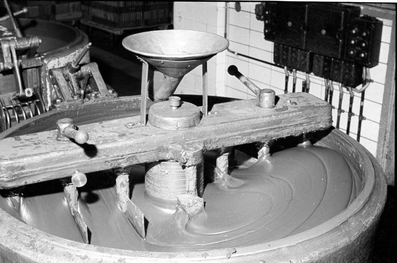 Wissoll Schokoladenfabrik 1962